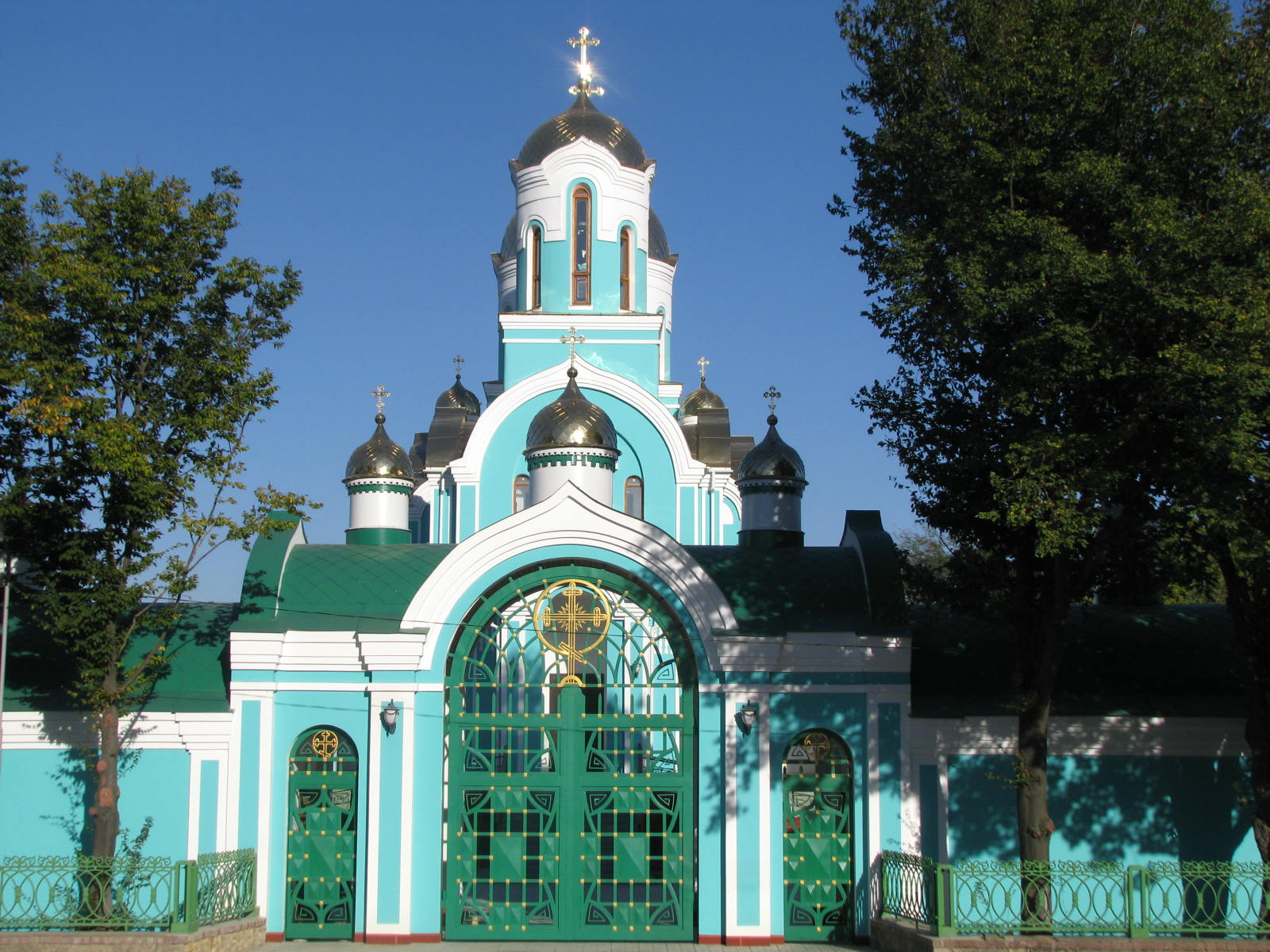 село Чорнобаївка